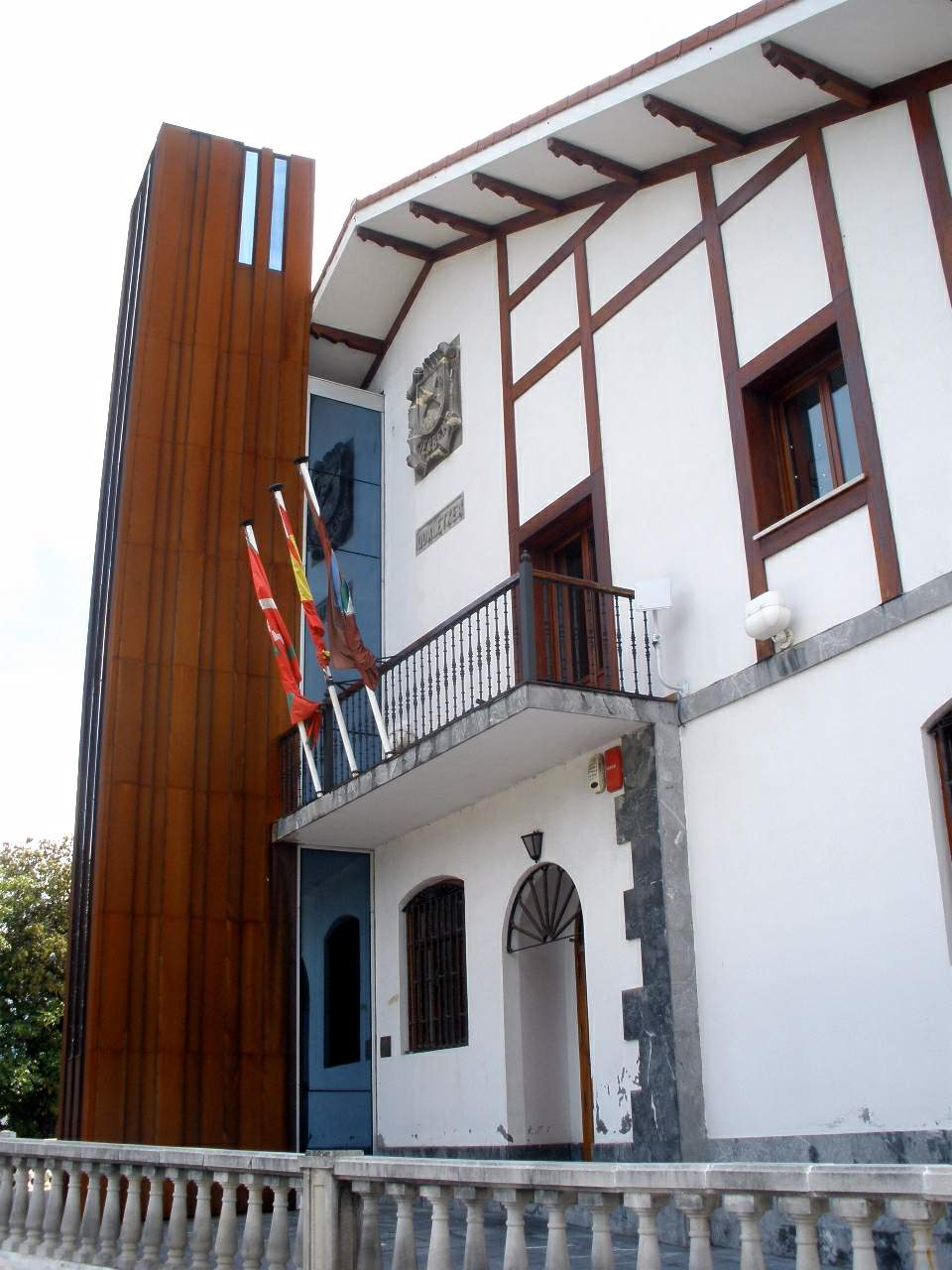 Ayuntamiento de Zierbena (Vizcaya)